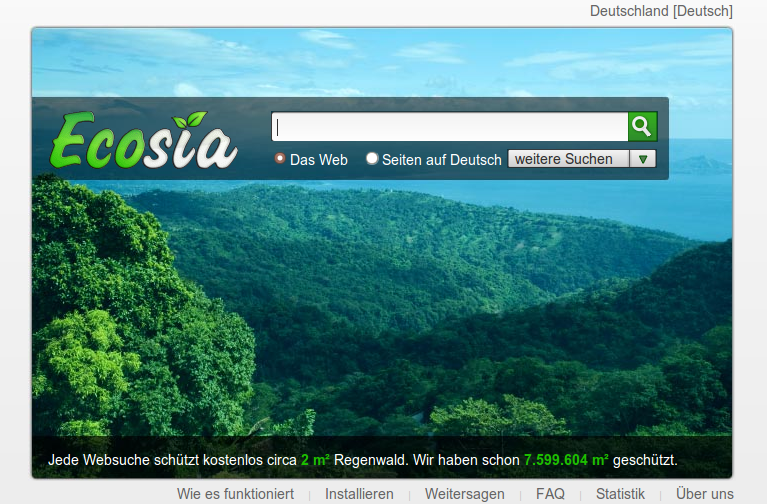 Ecosia Screenshot. Stand ca. 3. Februar 2010